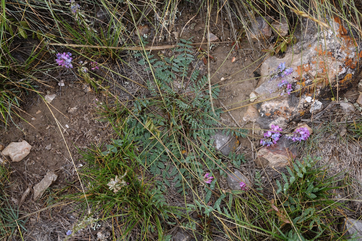 Kyrgyzstan, Issyk-Kul reg., Jety-Oguz distr., Kokshaal-Too Range, below Myurojan Pass, Bozjalpak Riv., 3400 m